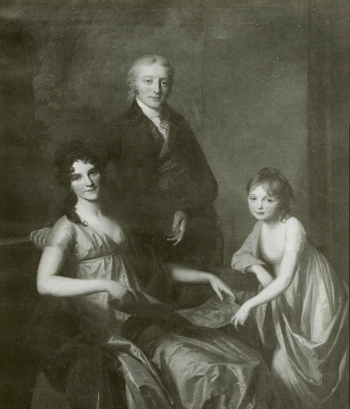 Johann August Friedrich Tischbein: Karl E. Löhr mit Gattin Juliane geb. Bause u. Tochter Henriette. Original als Ölgemälde im Museum der bildenden Künste Leipzig